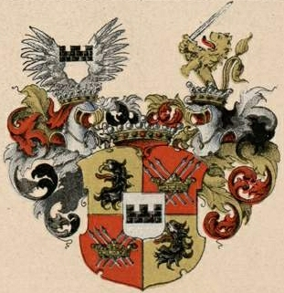 Wrangelli suguvõsa vabahärravapp (Elistvere)